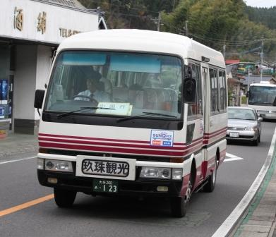 玖珠観光バスの123